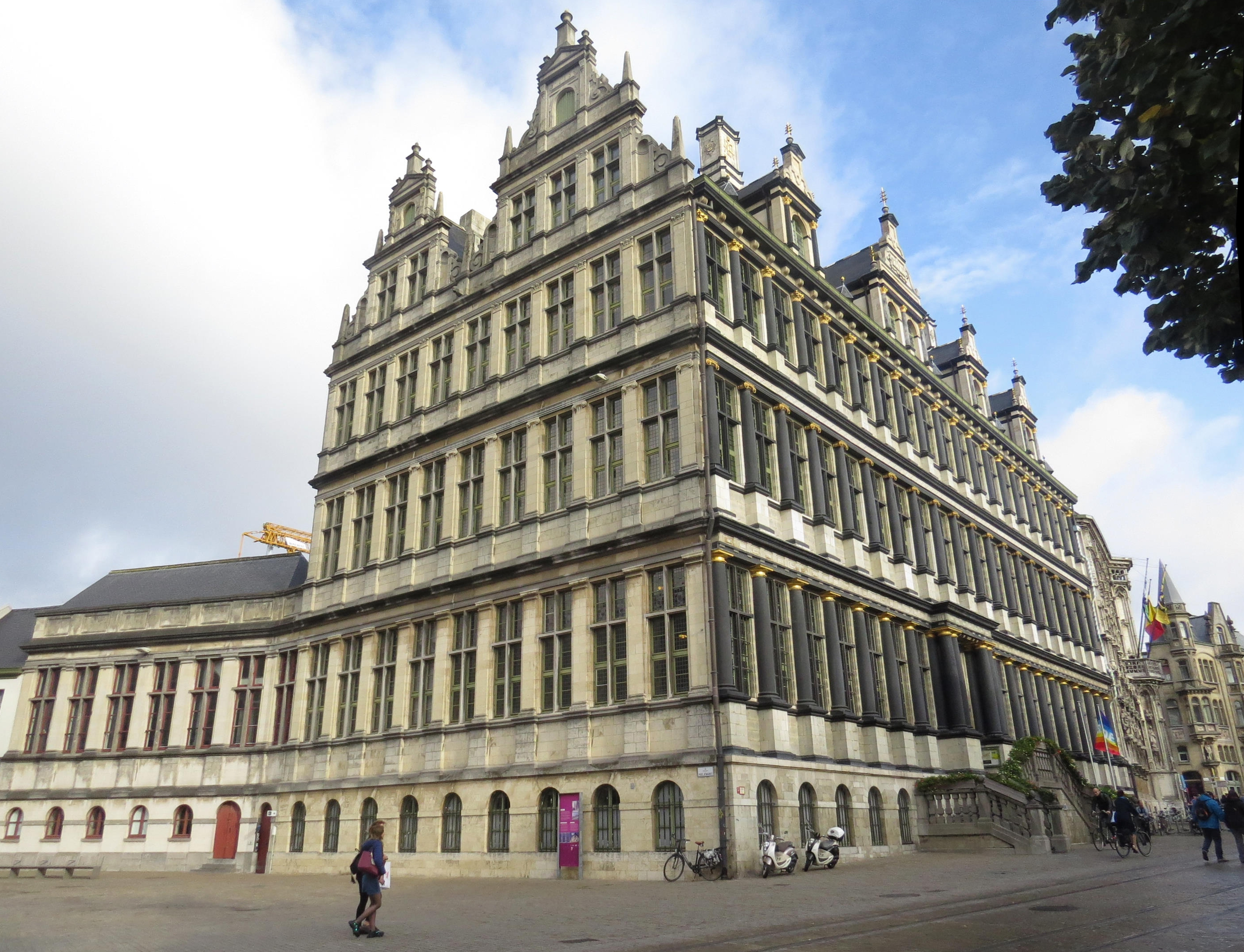 Gent, Altes Rathaus, Renaissance-Flügelbauten